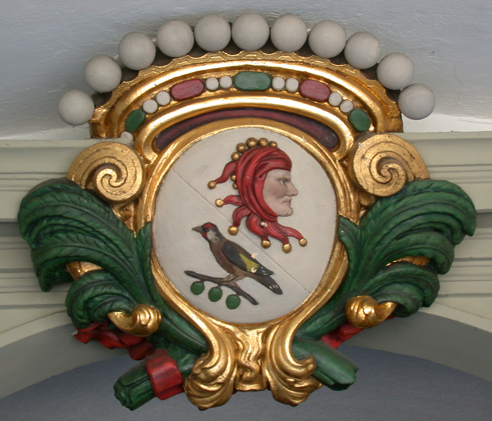 Wappen der Gesellschaft zu Distelzwang am Eingang des Gesellschaftshauses an der Gerechtigkeitsgasse 79.